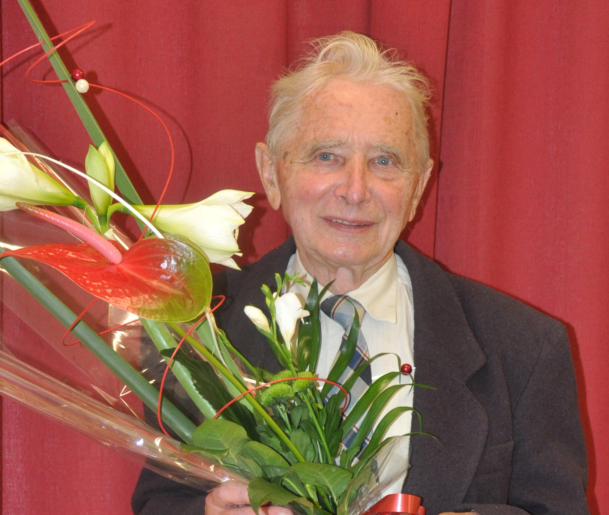 Karel Pexidr 2014